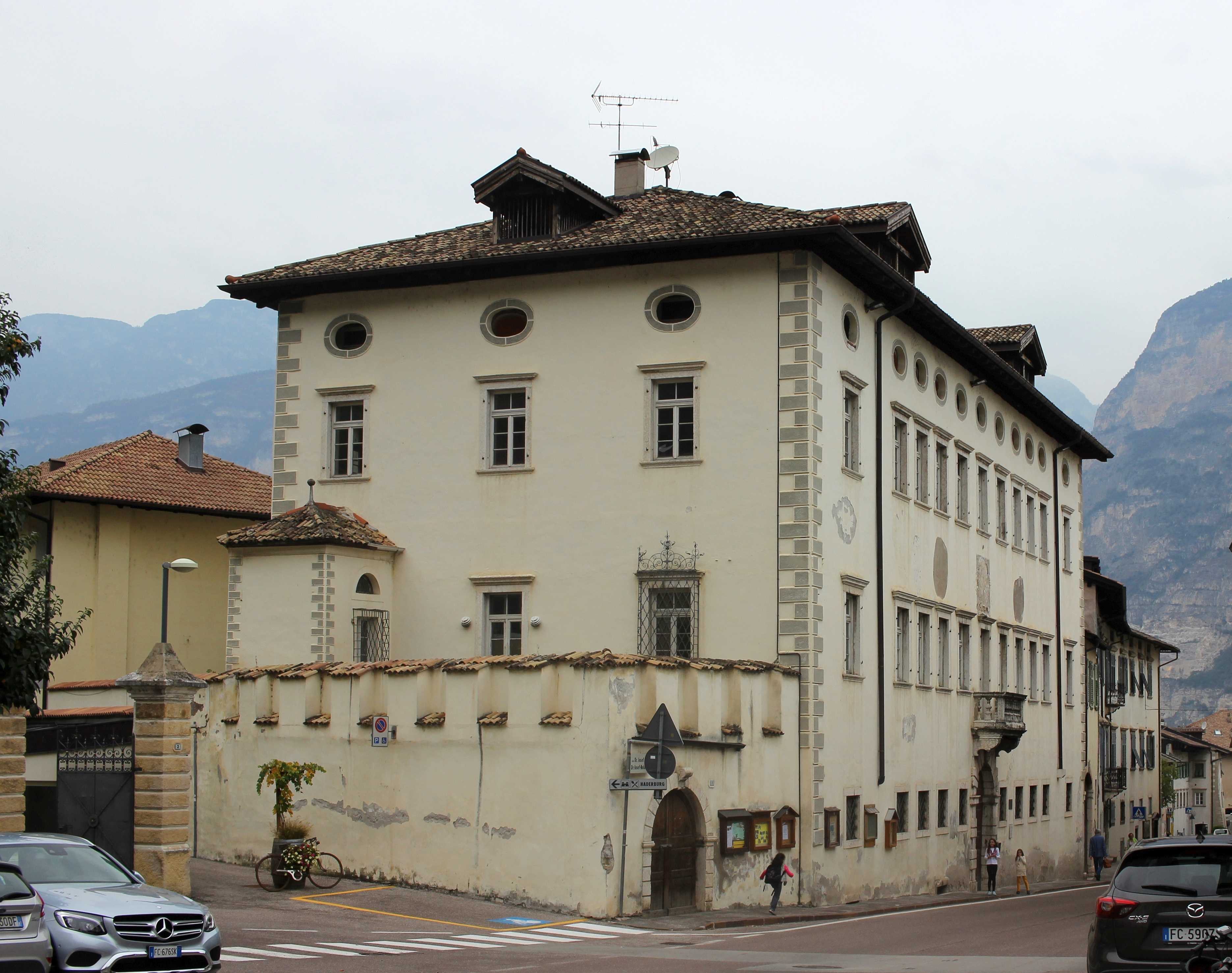 Josef-Noldin-Straße 1-3, Ansitz der Familie Gelmini von Kreutzhof in Salurn